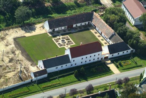 Nagytevel, Majorsági épület, barokk, 18. századi, azonosító: 10068 (törzsszám: 5085)